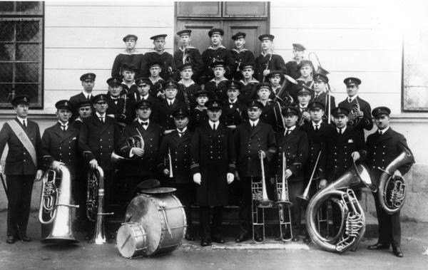 Flottans musikkår i Karlskrona uppställda för fotografering 1928. Längst till vänster på första raden står flaggtrumslagare Riego Åkerberg. Sjätte från vänster på samma rad är musikdirektören, den flitige marschkompositören Georg Ringvall (1880-1935) som var musikdirektör i kåren från 1915 till sin död.